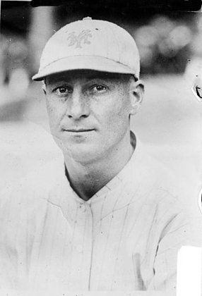 Picture of Bennie Kauff